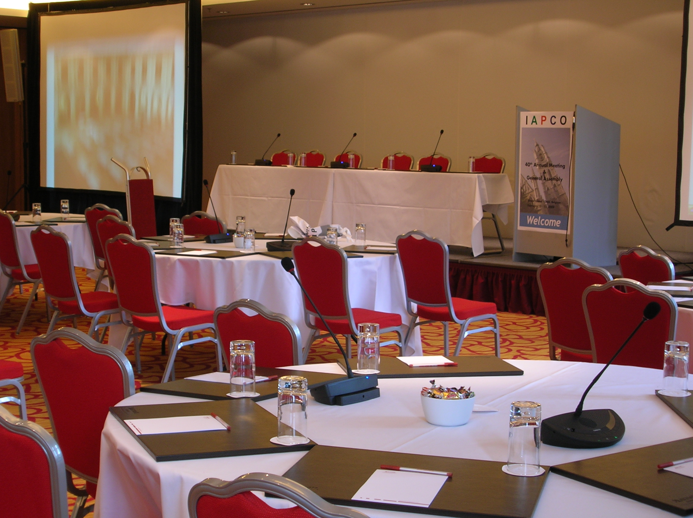 Инсталляция беспроводной конференц-системы Televic Confidea